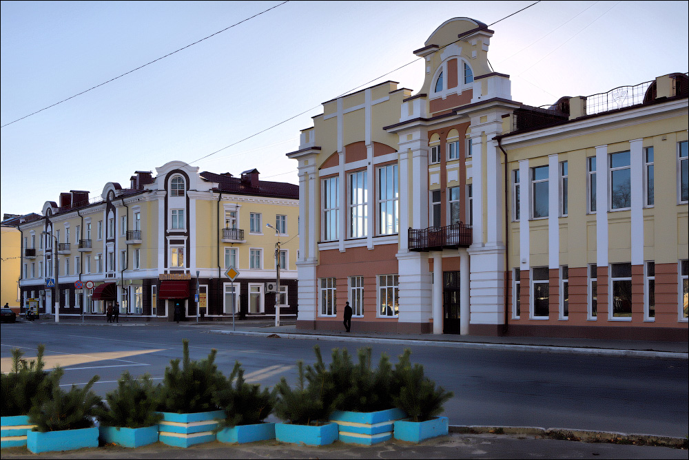 Рагачоўскія краявіды